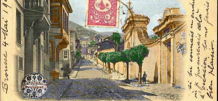 Bursa Ermeni Mahallesi - Kilise